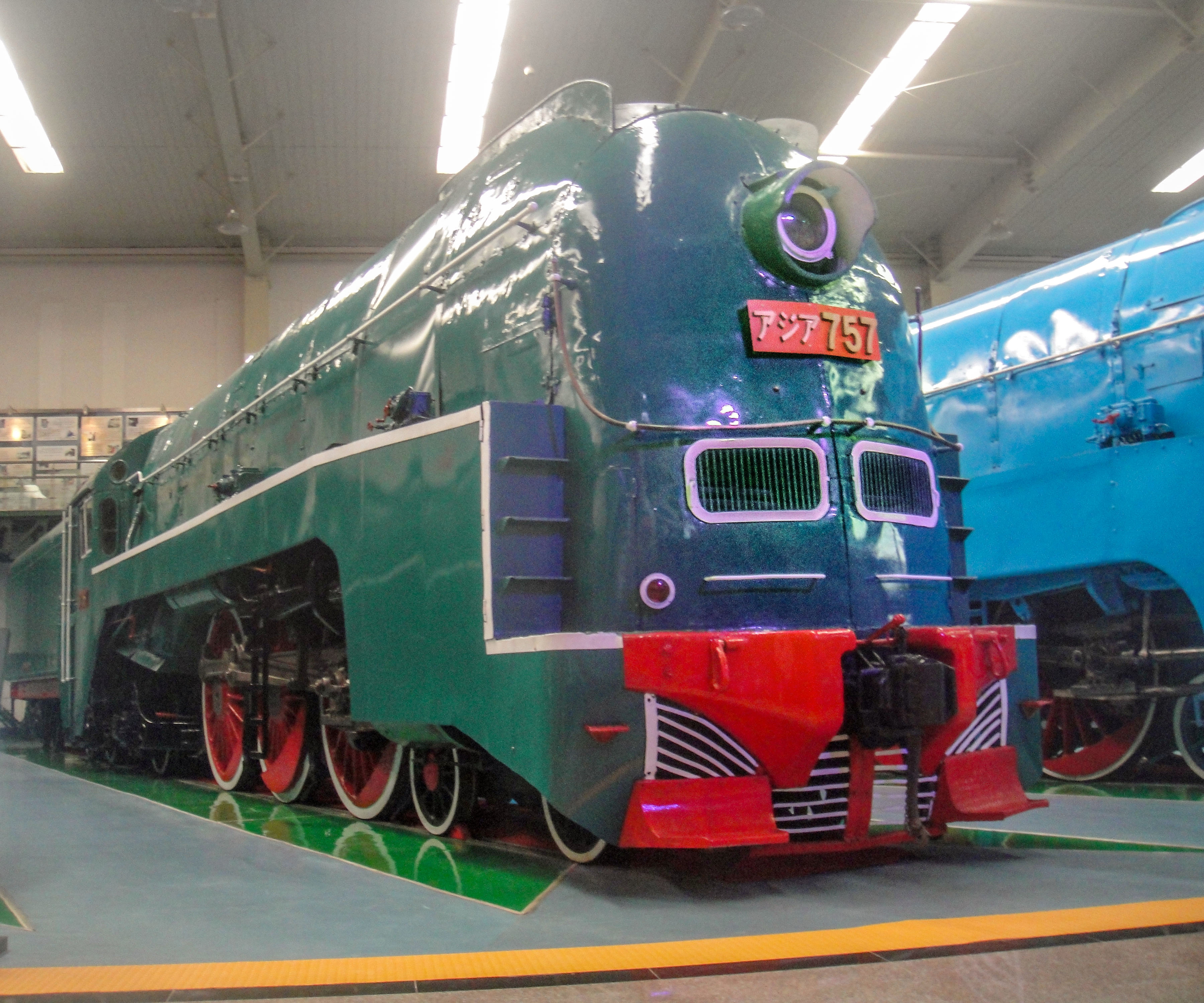 胜利7-757号蒸汽机车，保存于沈阳铁路陈列馆